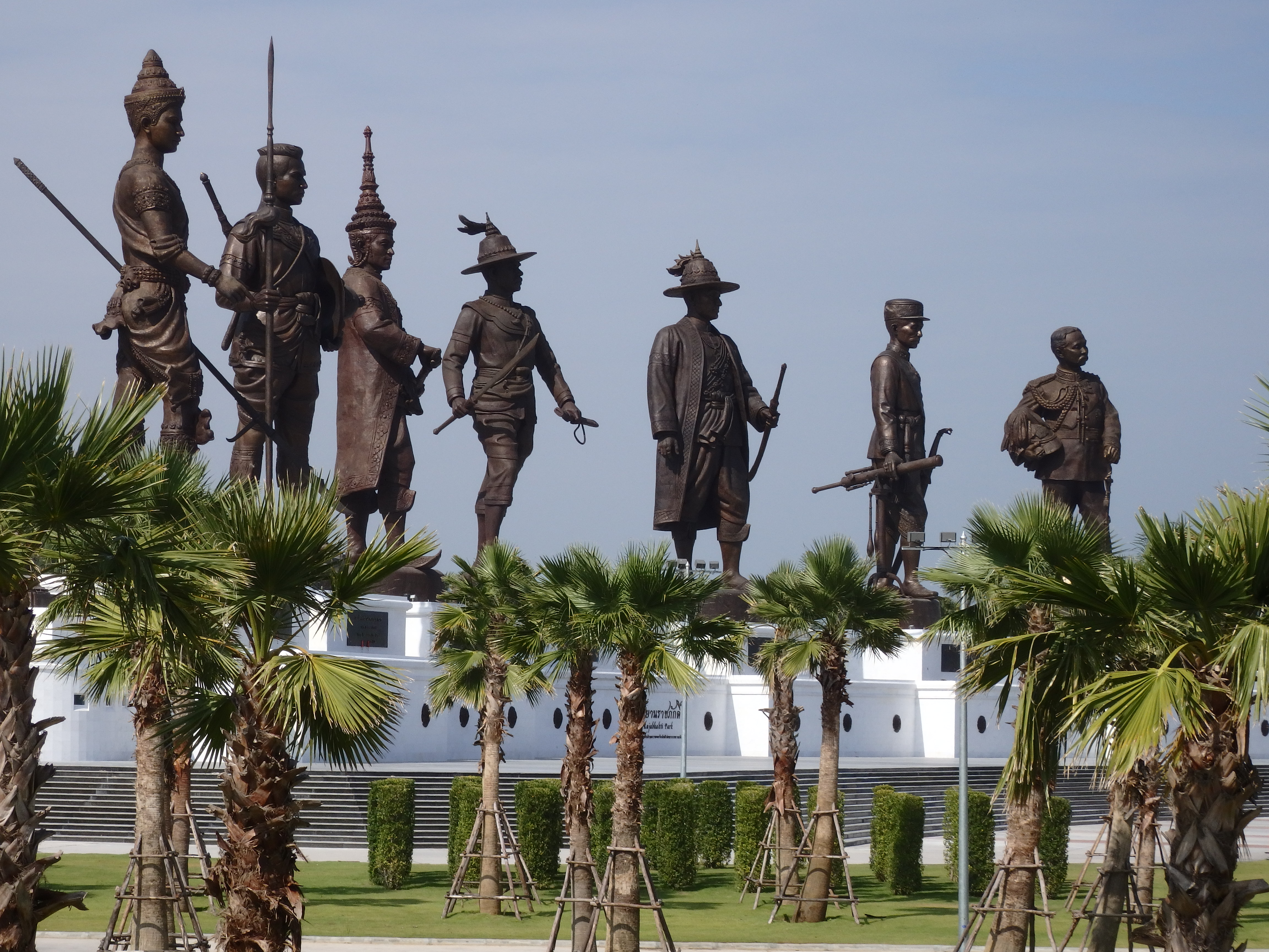 7 Kings